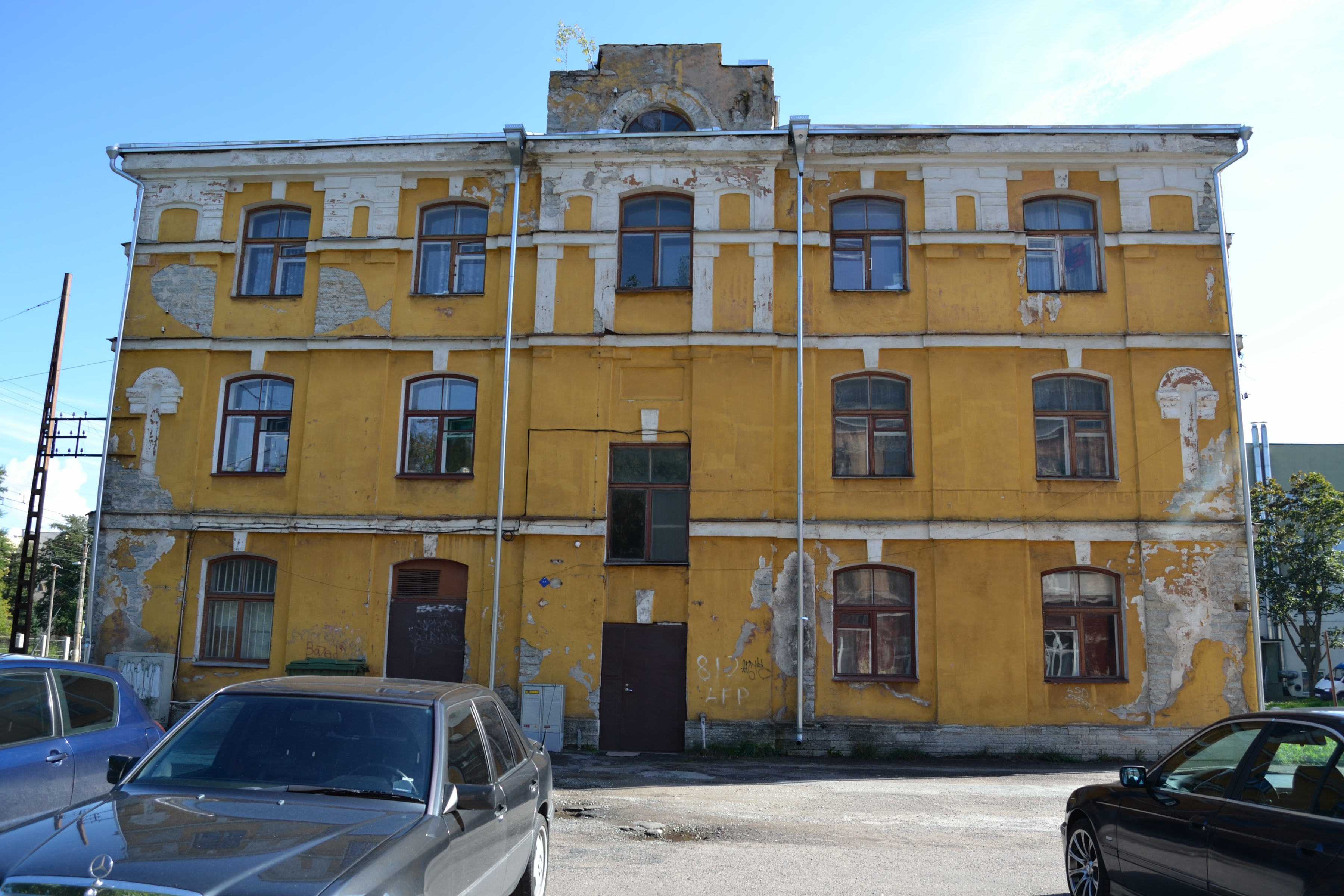 Tallinn, Bekkeri laevatehase meistrite ja ametnike elamu, 1912-1914